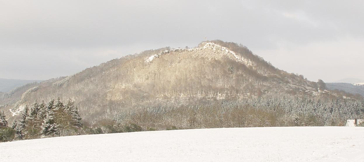 Burberg in der Eifel im Schnee